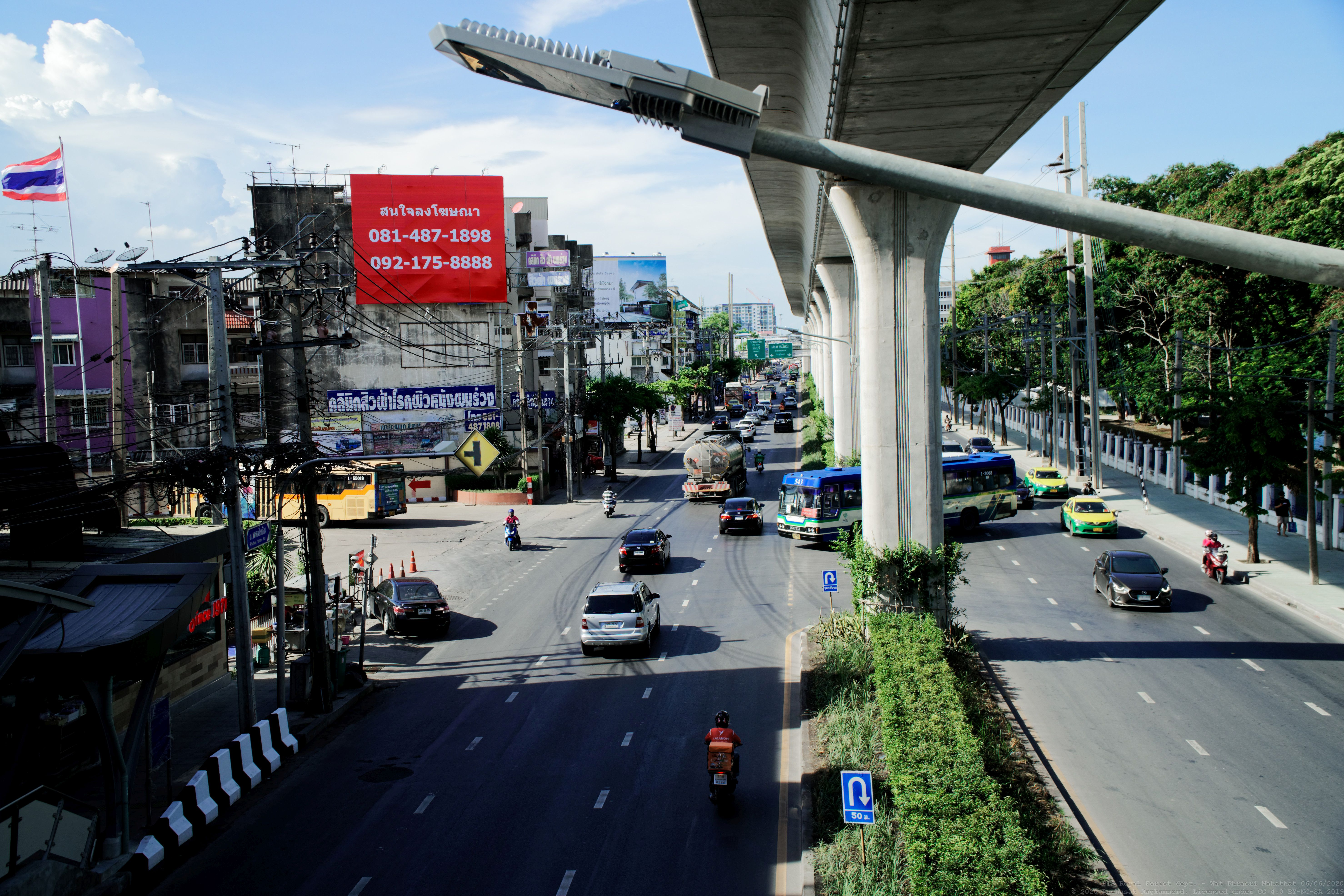 ทางกลับรถบริเวณอูรถเมล์บางเขน มองจากทางออกสถานีกรมทหารราบที่ 11